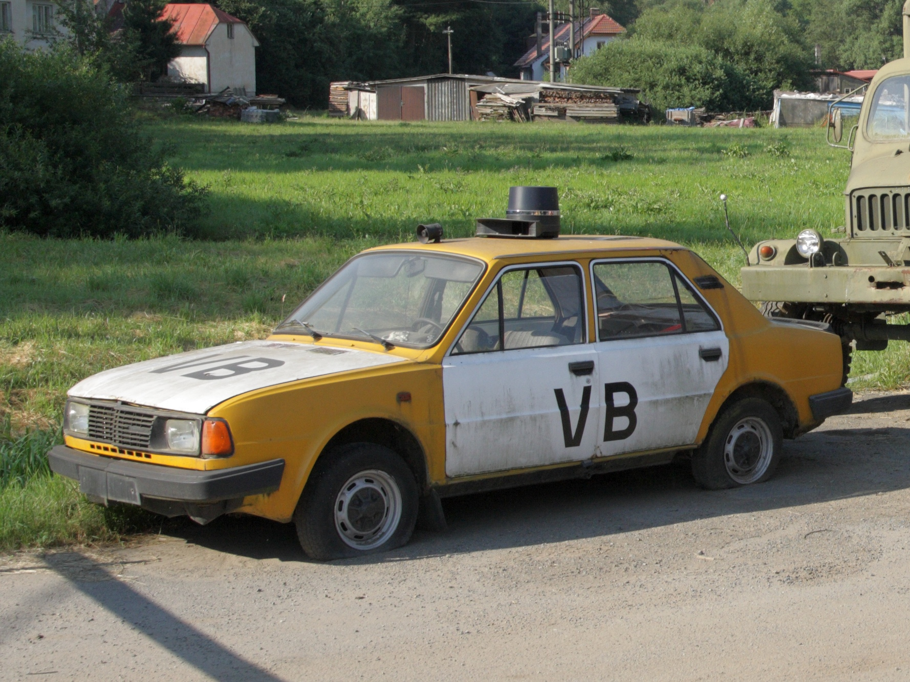 Škoda 105 jako vozidlo Veřejné Bezpečnosti